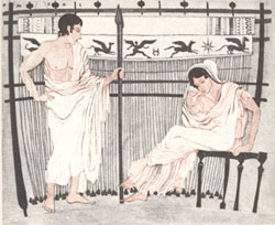 Изображение с греческой вазы. Пенелопа и Телемах у вертикального ткацкого станка.